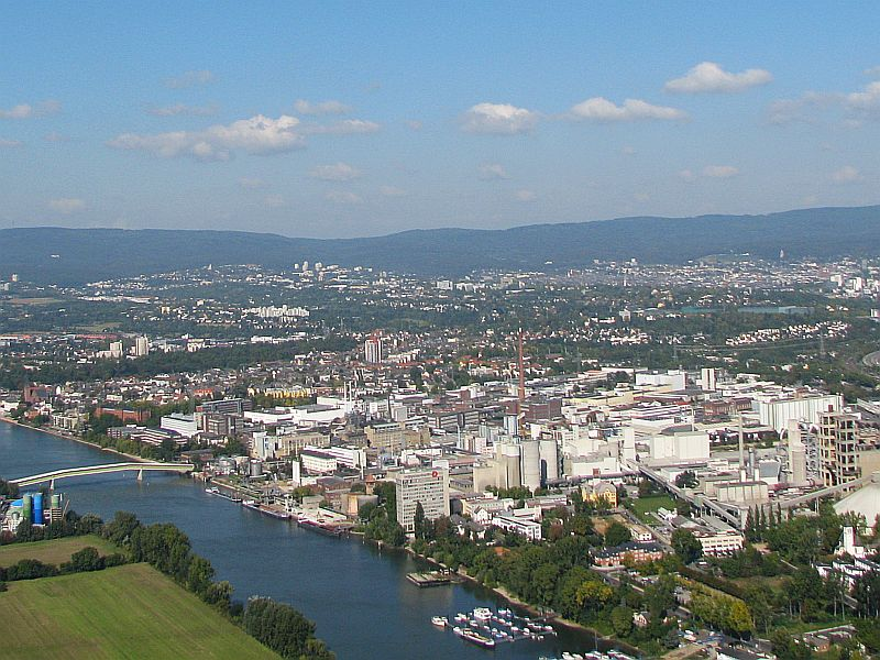 Wiesbaden Luftbild Rhein Petersaue Mainz-Amöneburg Foto 2008 Wolfgang Pehlemann Wiesbaden IMG_0112